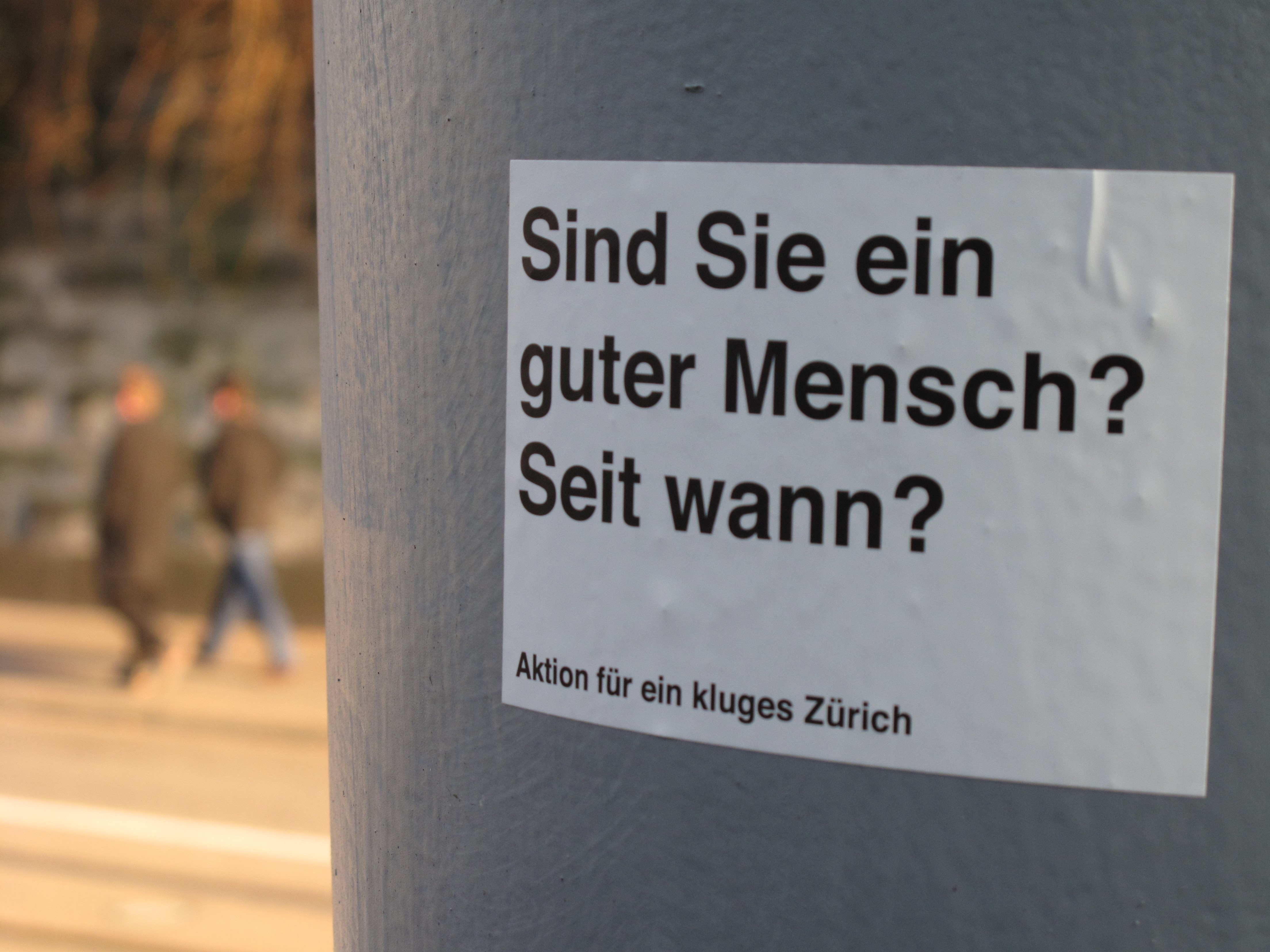 Ein Aufkleber der »Aktion für ein kluges Zürich«, einem Street-Art-Projekt des Zürcher Schriftstellers Thomas Meyer.